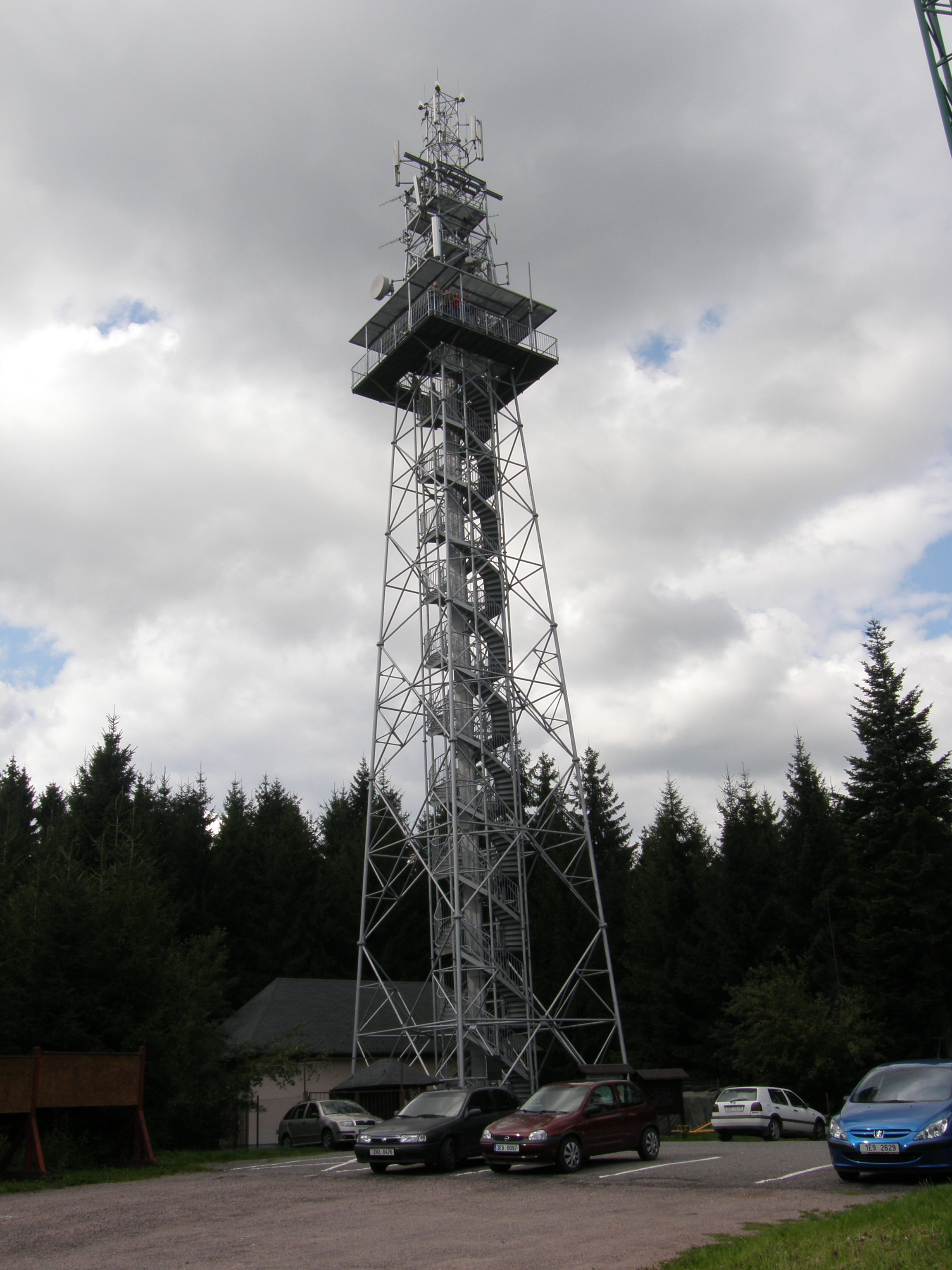 Rozhledna Stříbrná krasavice na Andrlově chlumu